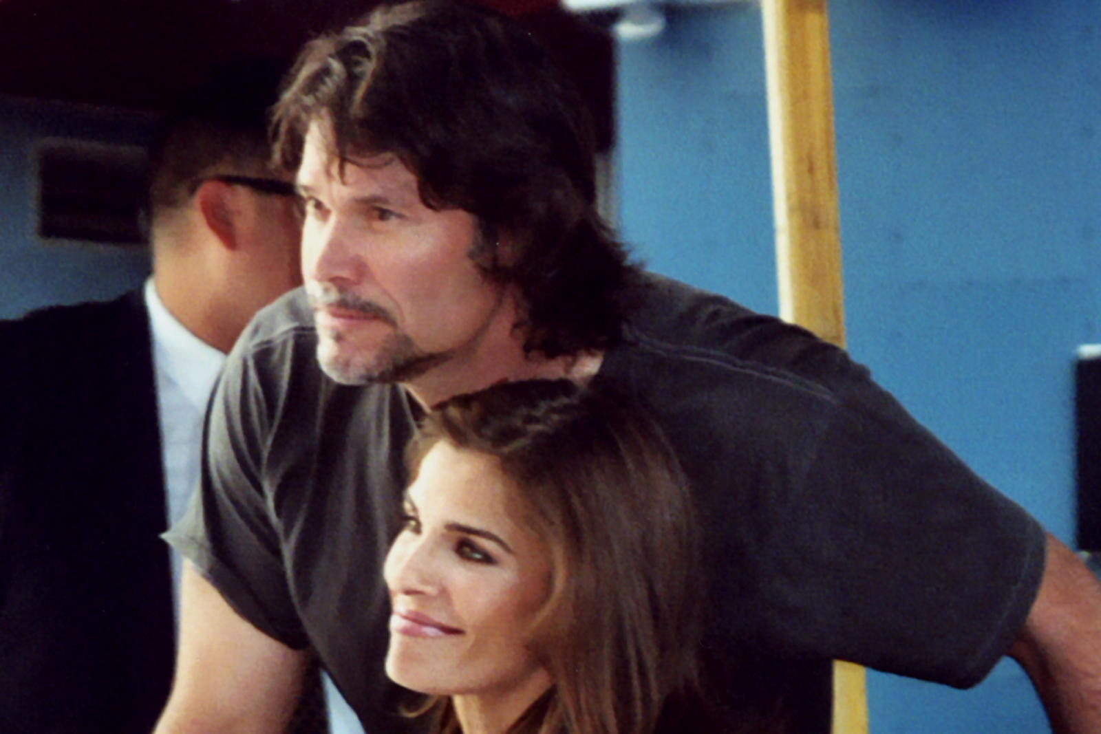 Peter Reckell & Kristian Alfonso Fan Fest 04